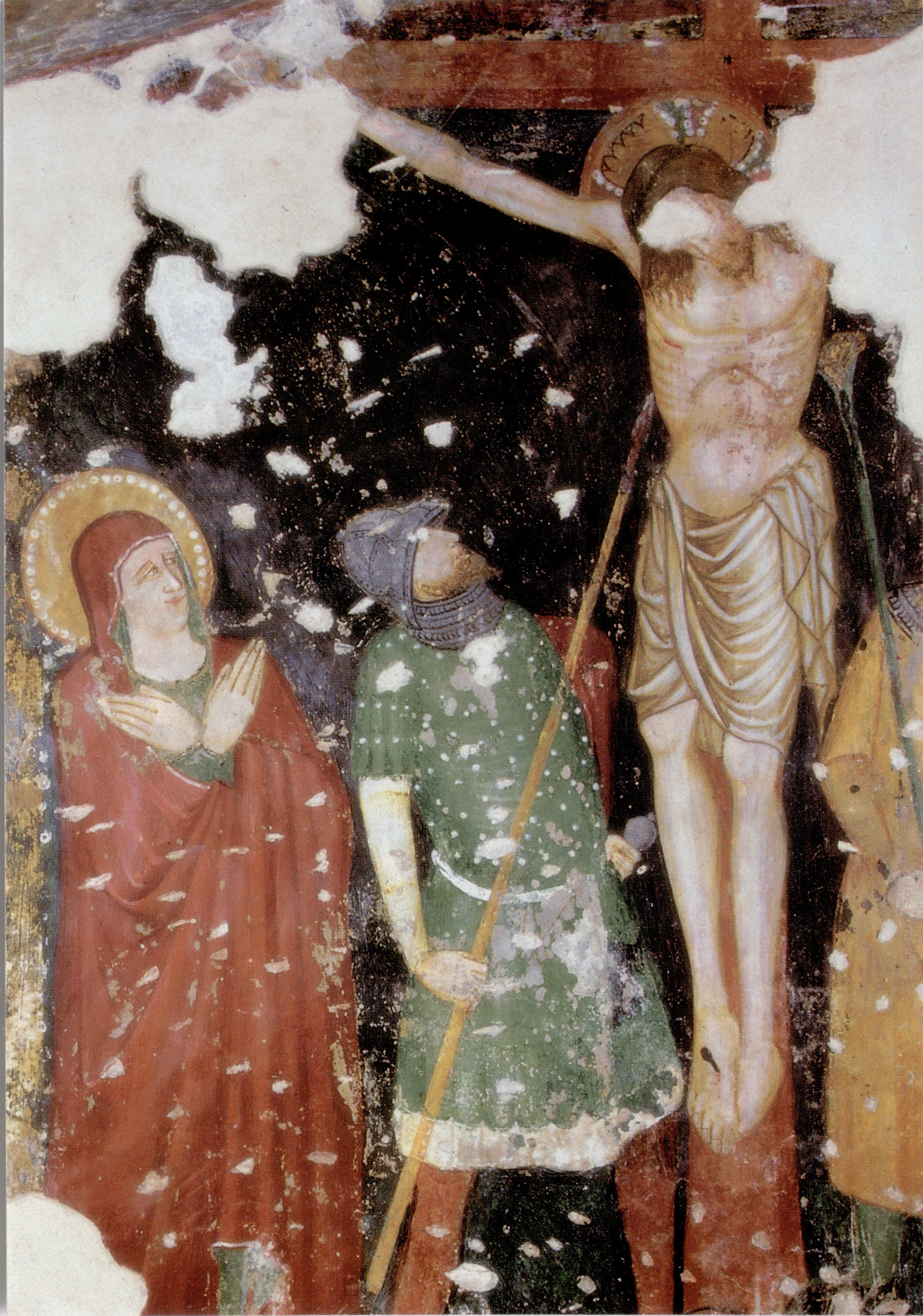 Anonimo del XIV secolo - Crocifissione secolo XIV Affresco Duomo, Gemona del Friuli